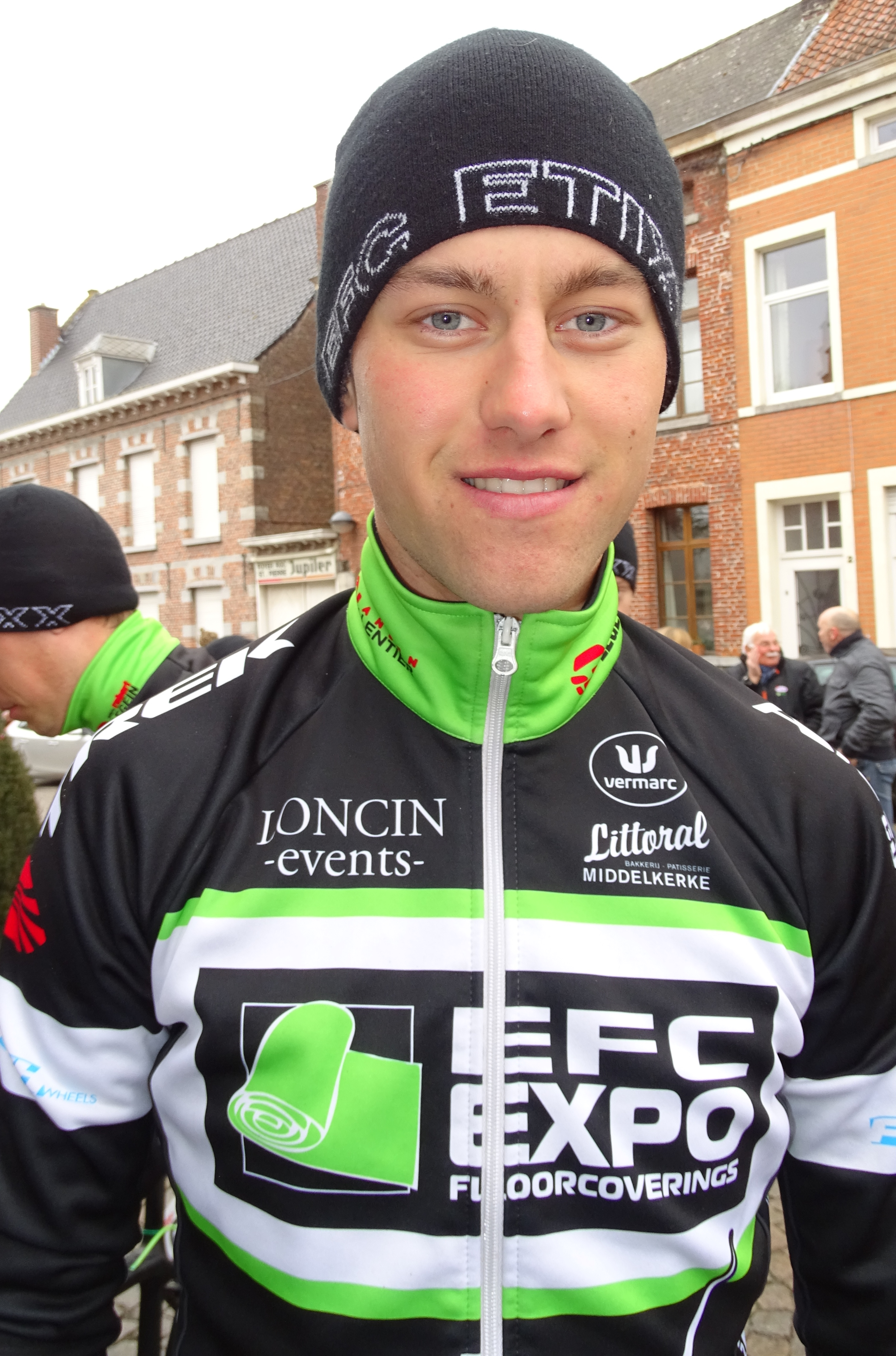 Triptyque des Monts et Châteaux 2015 Depicted team: EFC-Etixx